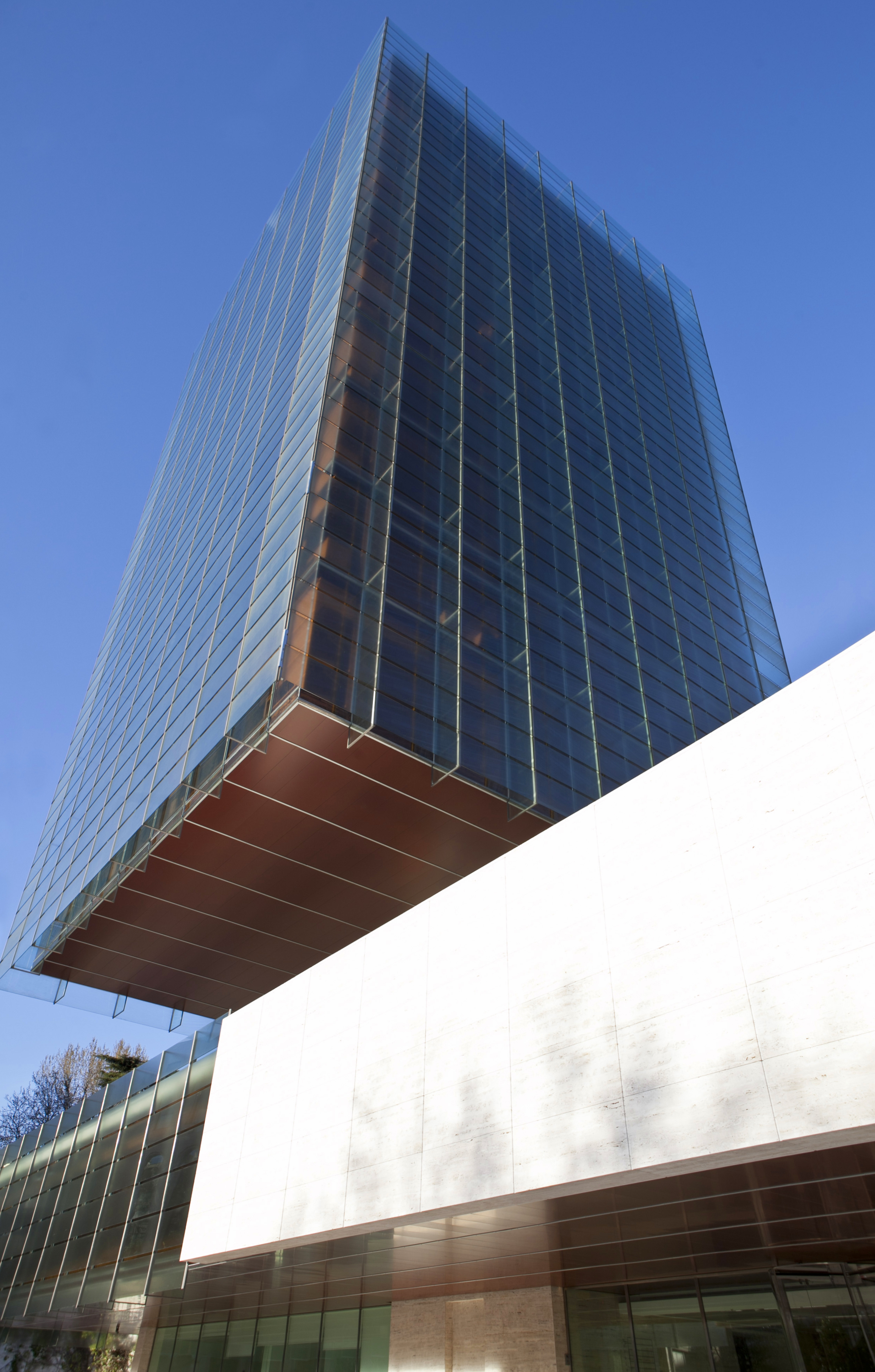 El emblemático edificio proyectado por Rafael de la Hoz y Gerardo Olivares está dotado de los más modernos sistemas de sostenibilidad, eficiencia y accesibilidad y facilita el trabajo en equipo, garantizando el máximo confort a los clientes de Pérez-Llorca. Además, el edificio permite un aprovechamiento máximo de la luz natural ayudando al ahorro energético.